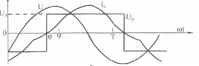 Діаграми роботи схеми РЛВТ